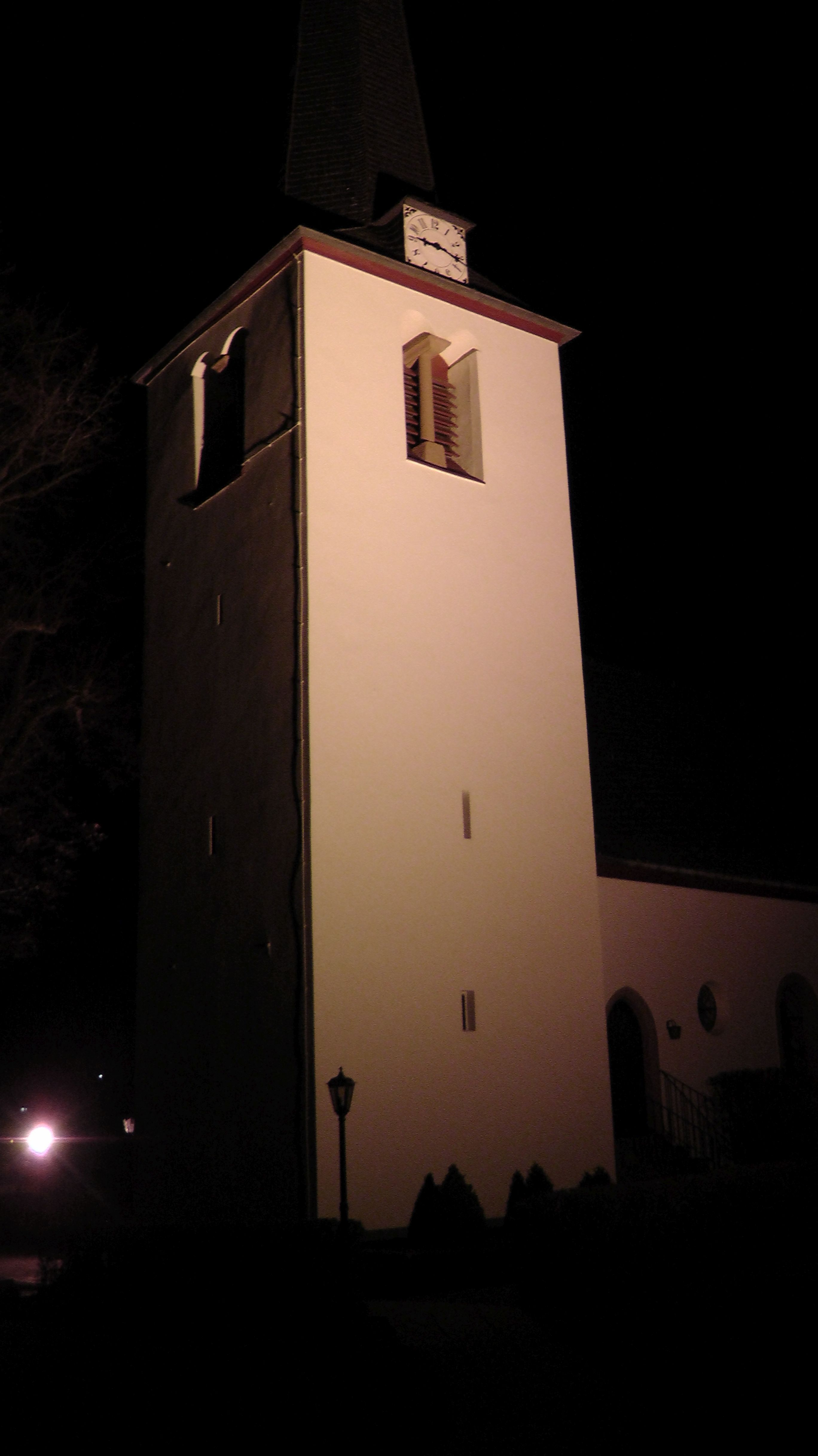 Evangelische Kirche Mülheim Mosel, Turm, nachts